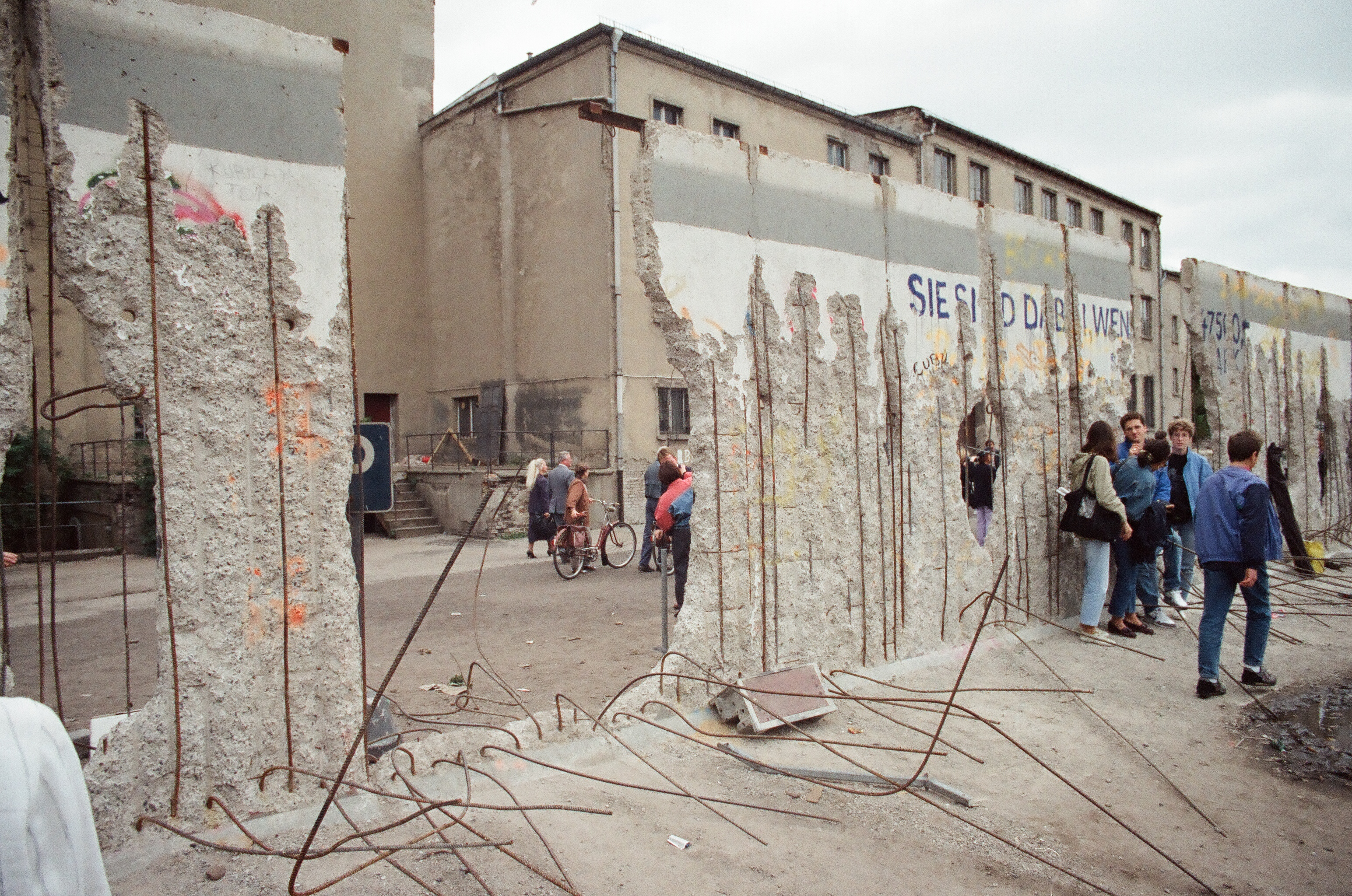 Mauerspechte